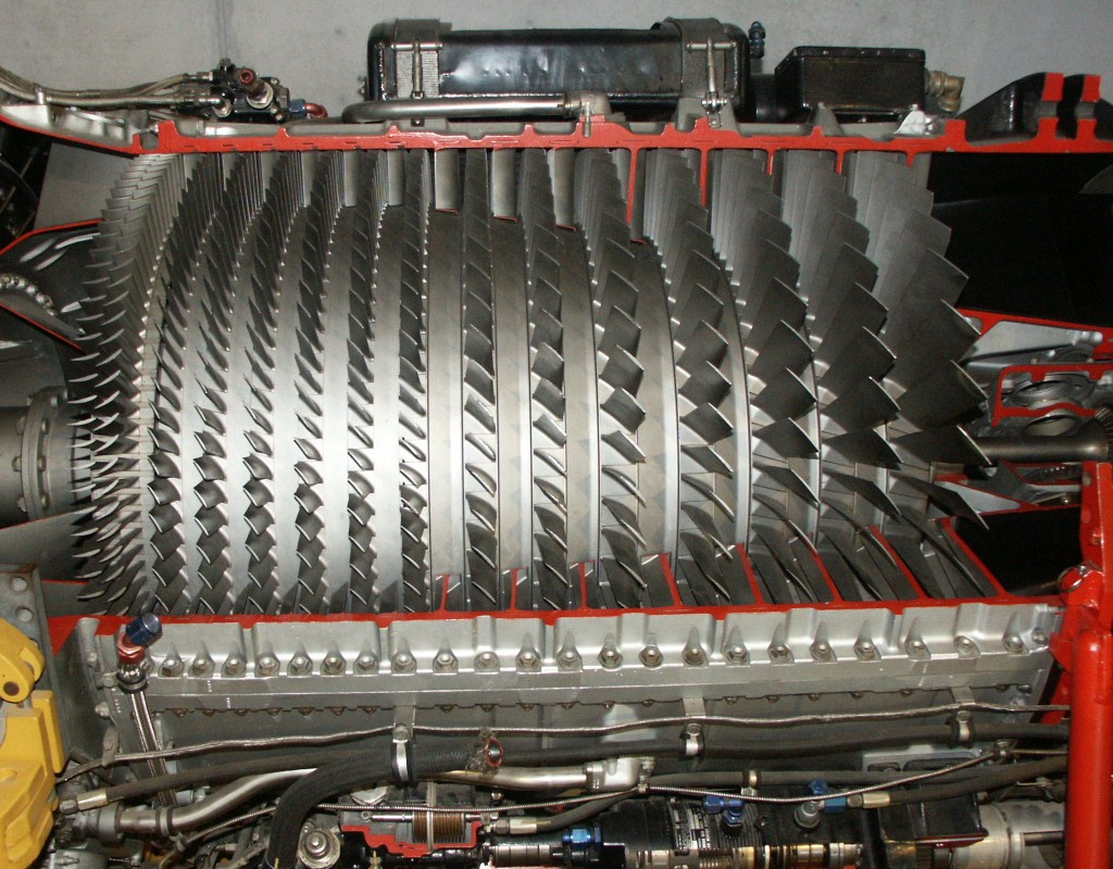 Axialkompressor eines Wright J65 Strahltriebwerkes. Lufteintritt von rechts.